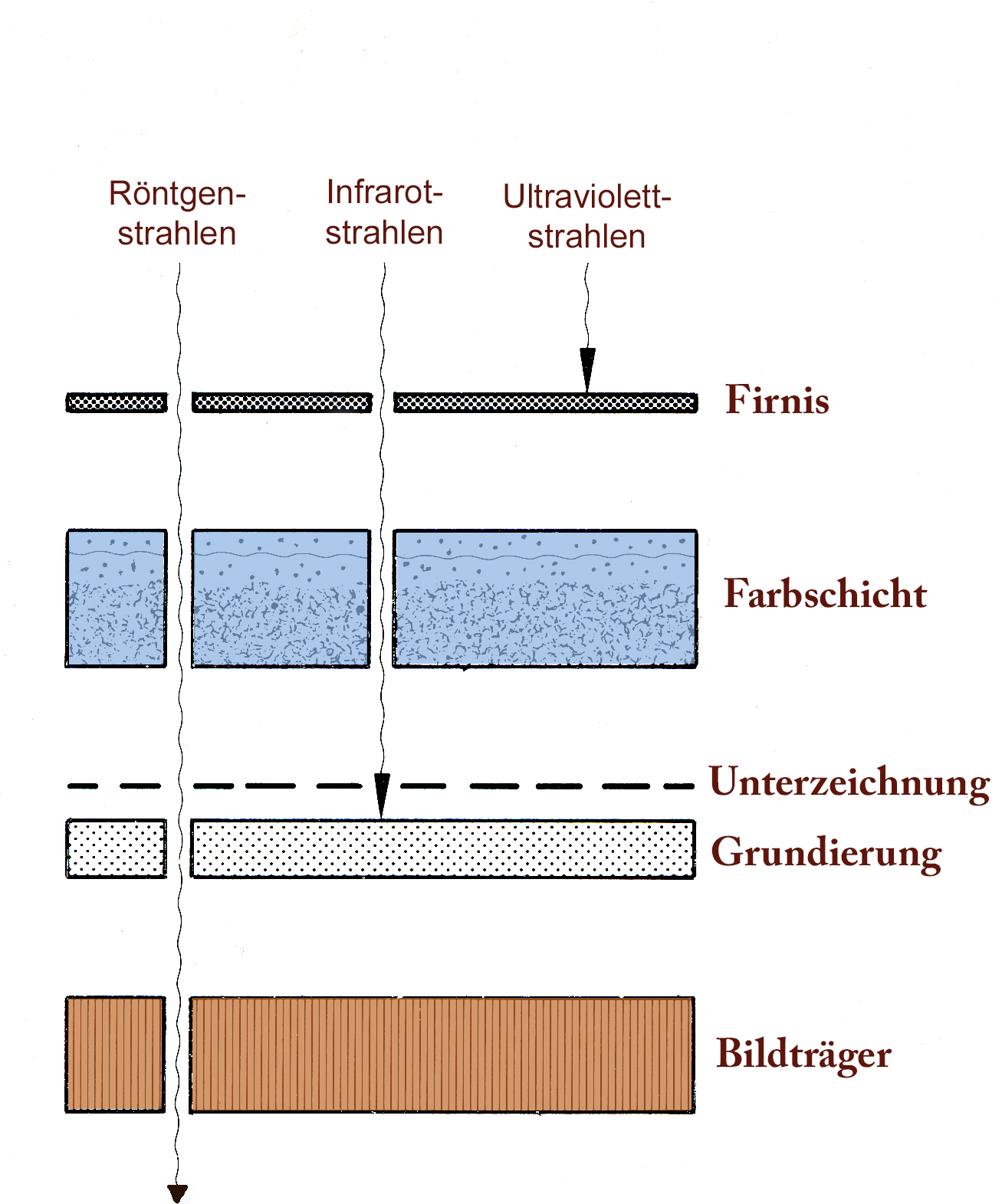 An diesem chematisierten Gemäldeaufbau wird das unterschiedliche Durchdringungsvermögen der UV-, Infrarot- und Röntgenstrahlen dargestellt.